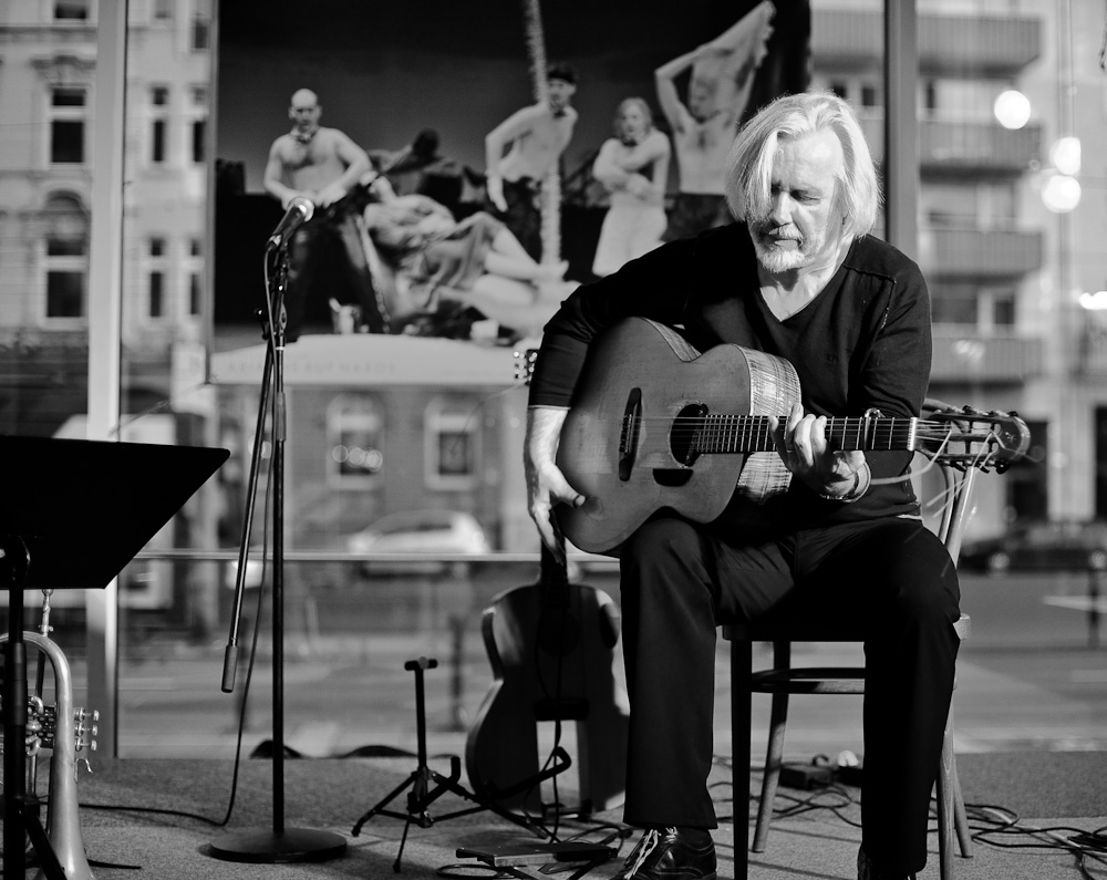 Claus Boesser-Ferrari (Gitarre) bei einer Live-Session mit Thomas Siffling (Trompete) im Mannheimer Nationaltheater anläßlich der Reihe "Nightmoves"